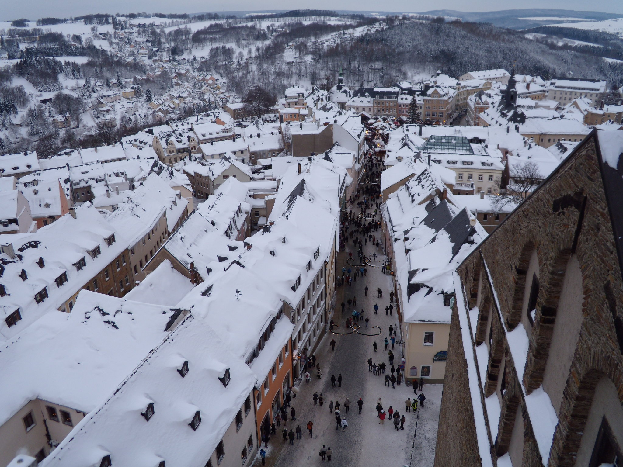 Blick auf Annaberg-Buchholz